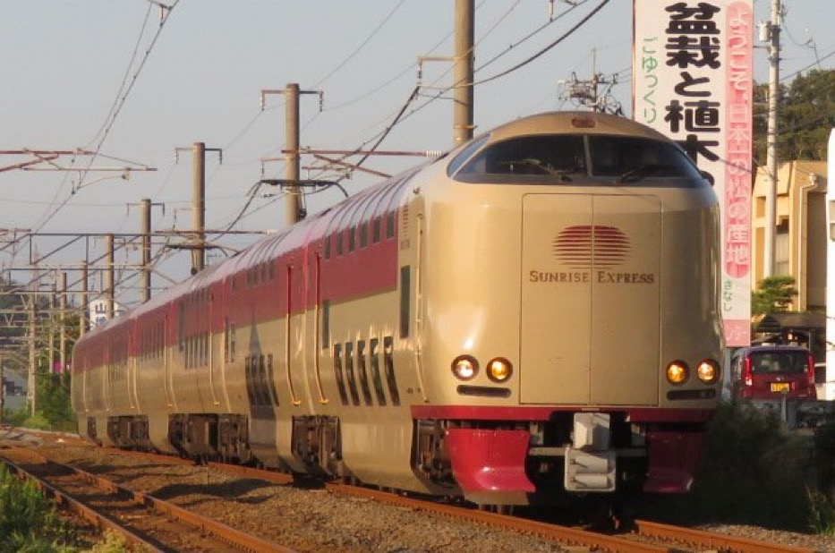 285系I2編成 サンライズエクスプレス瀬戸 高松行き